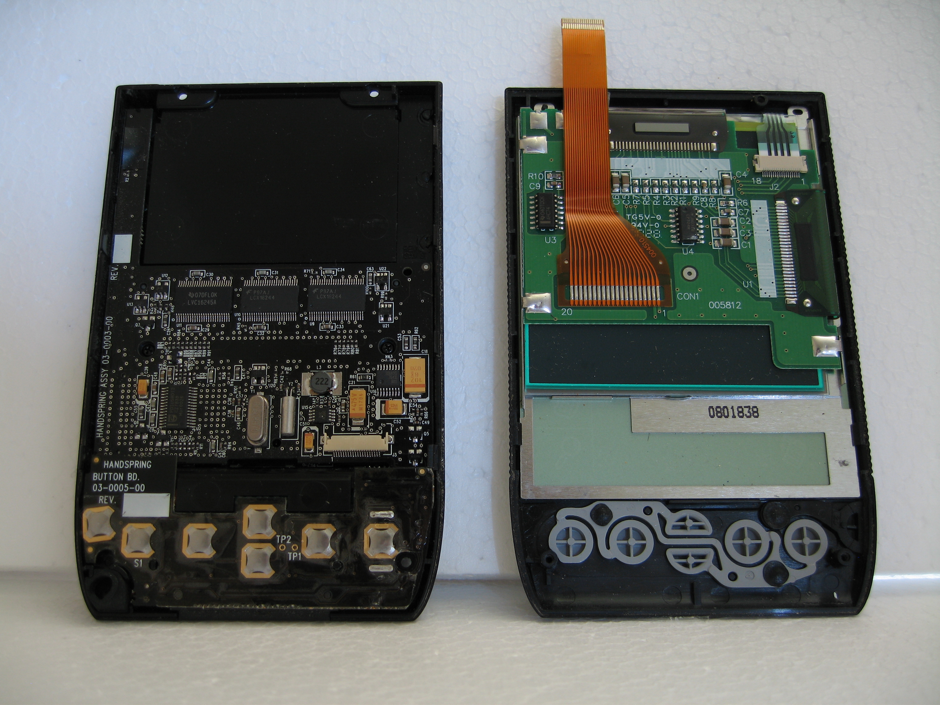 Handspring Visor inside